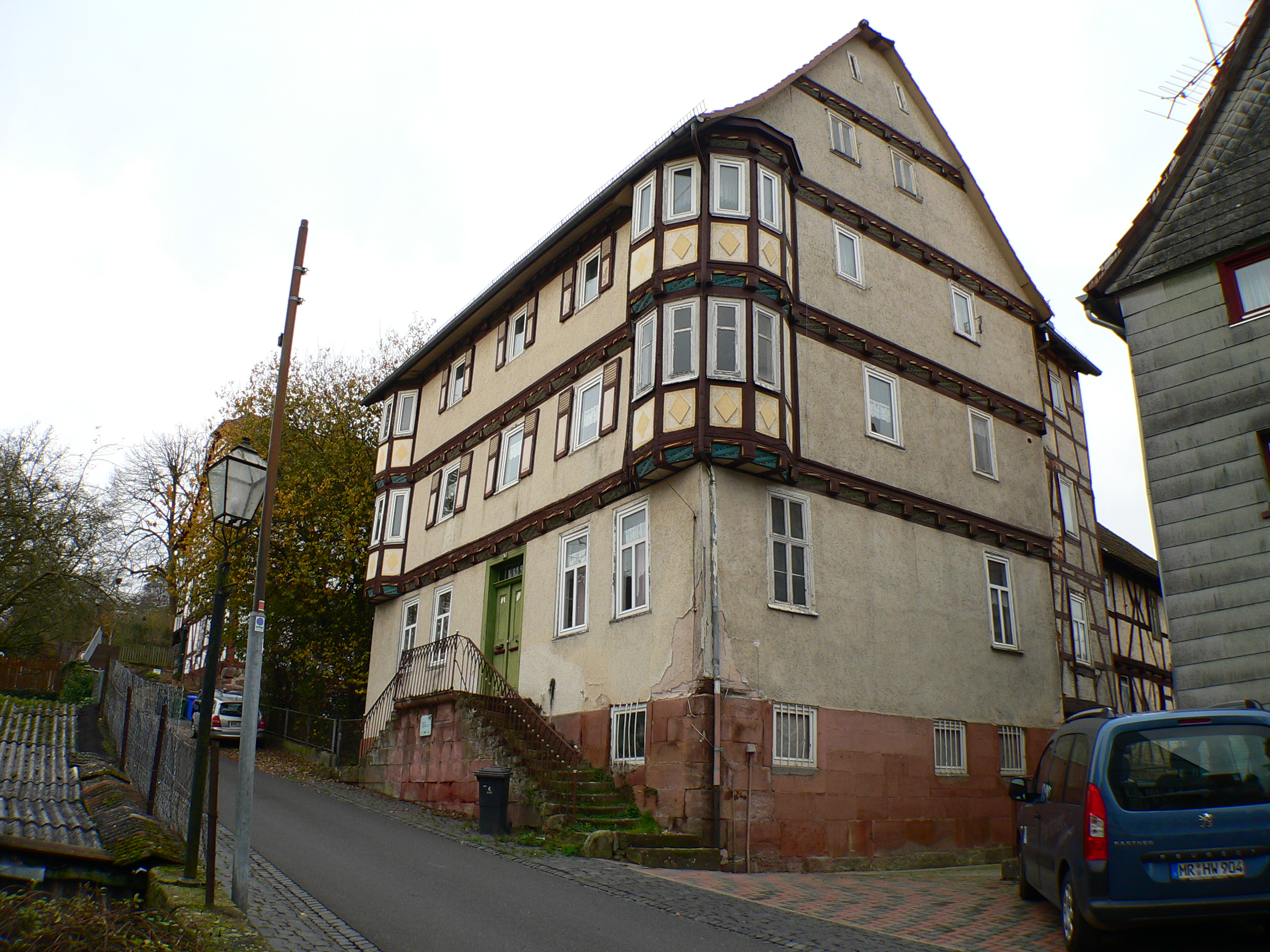 Burgmannenhaus in Rauschenberg, Hessen, Deutschland